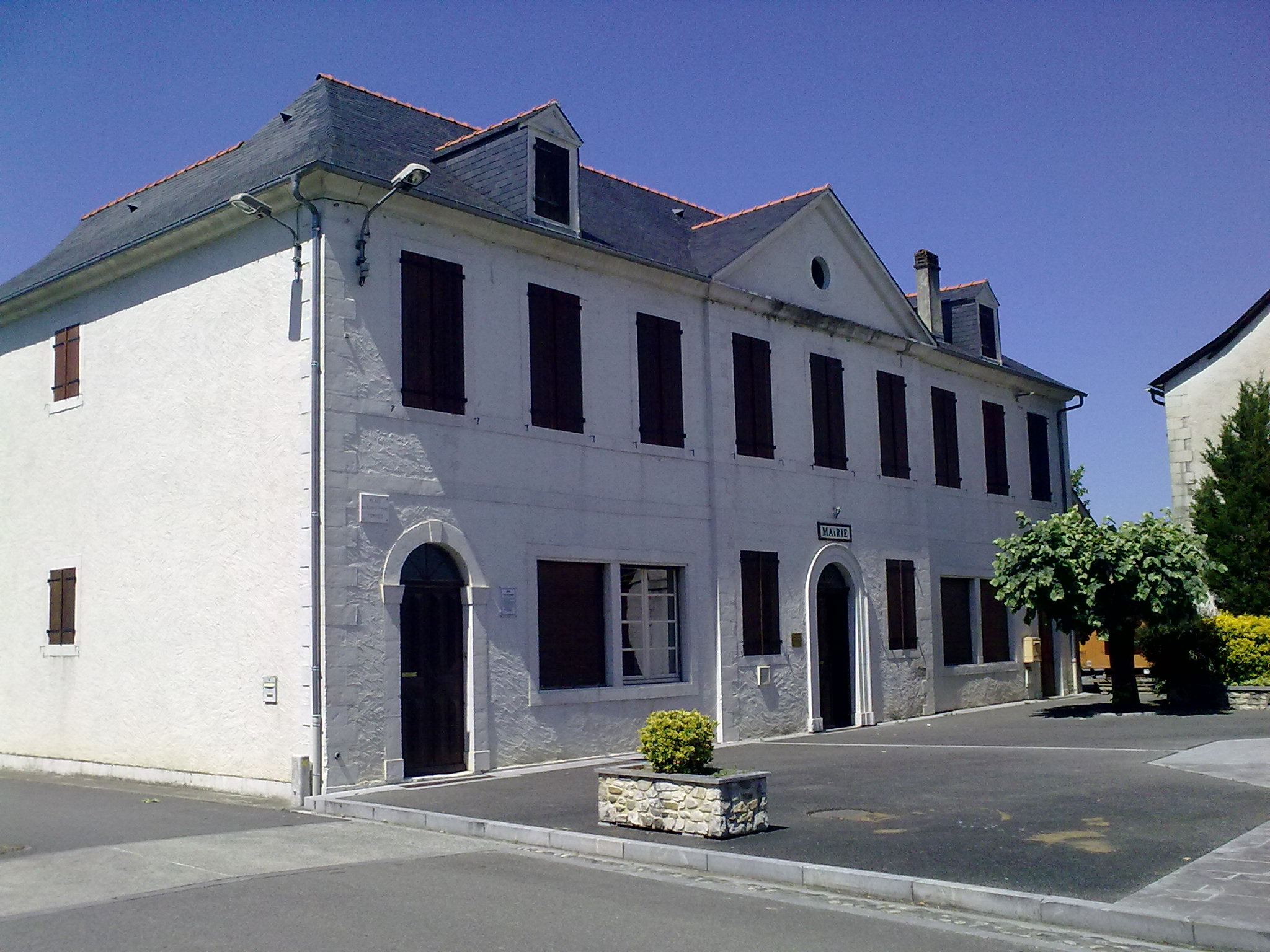 Mairie de Arros-de-Nay.